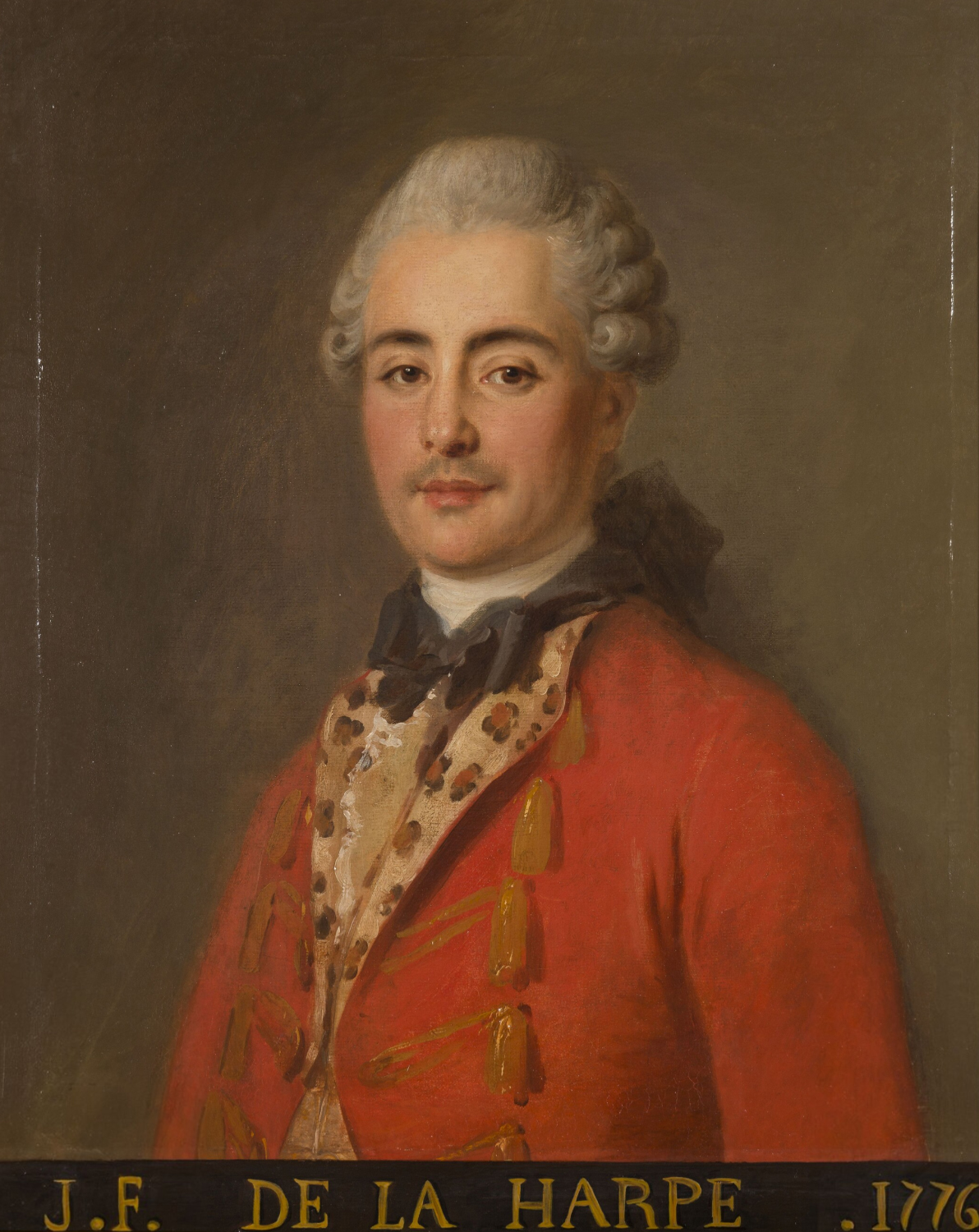 Portrait of Jean François de La Harpe (1739-1803)